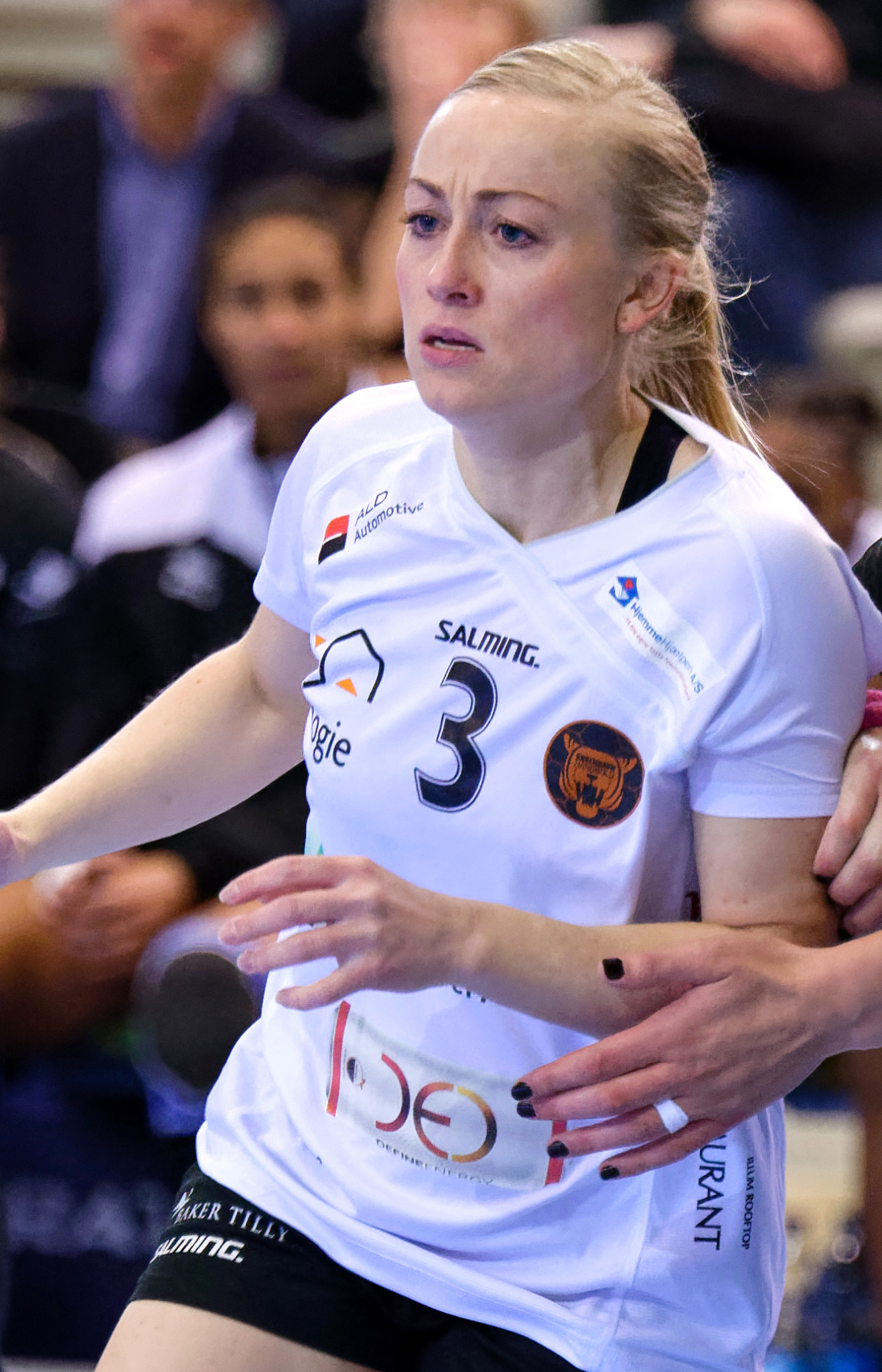 Rencontre de coupe EHF entre Issy Paris Hand et les danoises de Copenhague. A Issy-les-Moulineaux, le 28 janvier 2018.